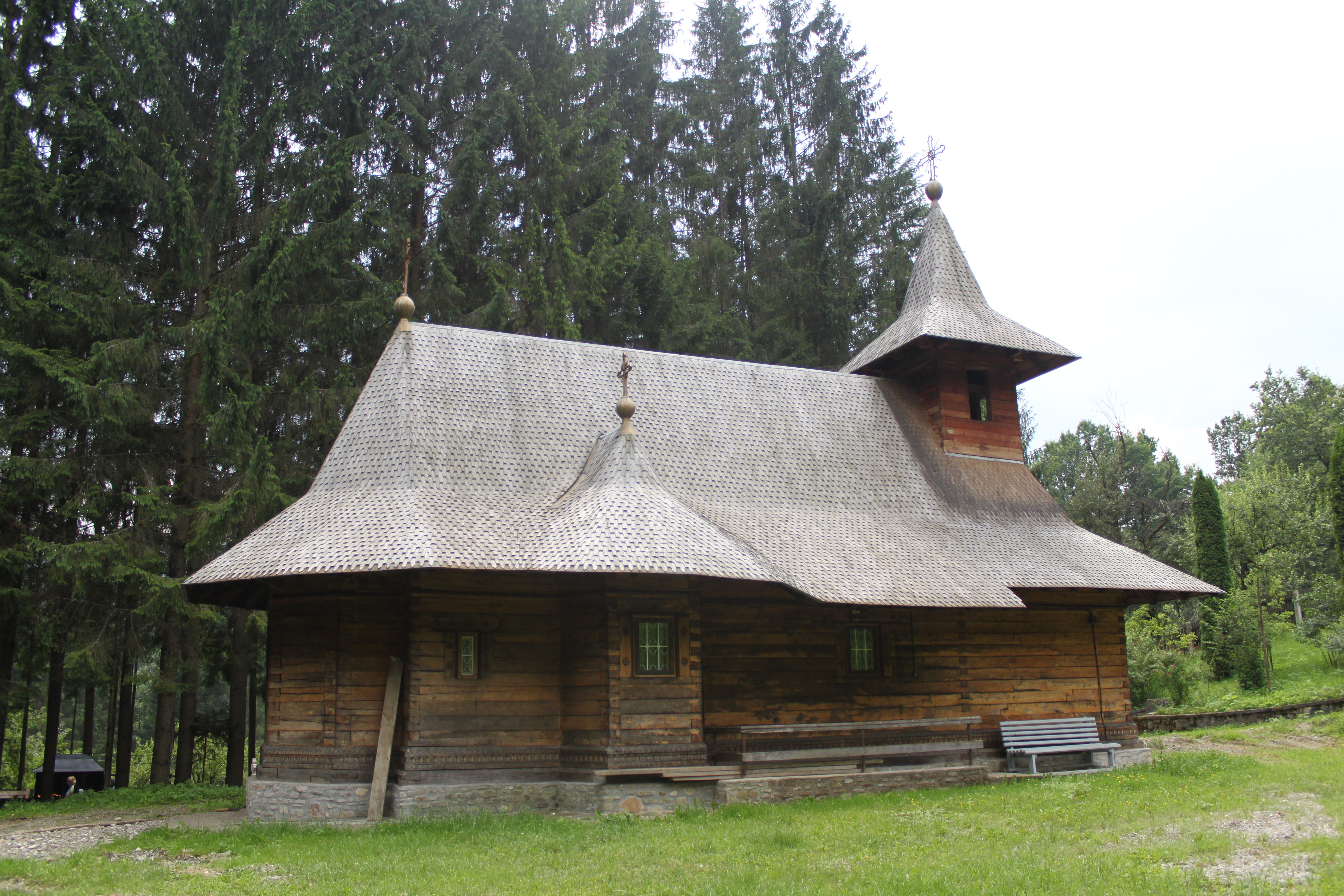 Biserica de lemn cu hramul Sfinţii Voievozi din cimitirul mănăstirii Sihăstria, Vânători-Neamţ, judeţul Neamţ.